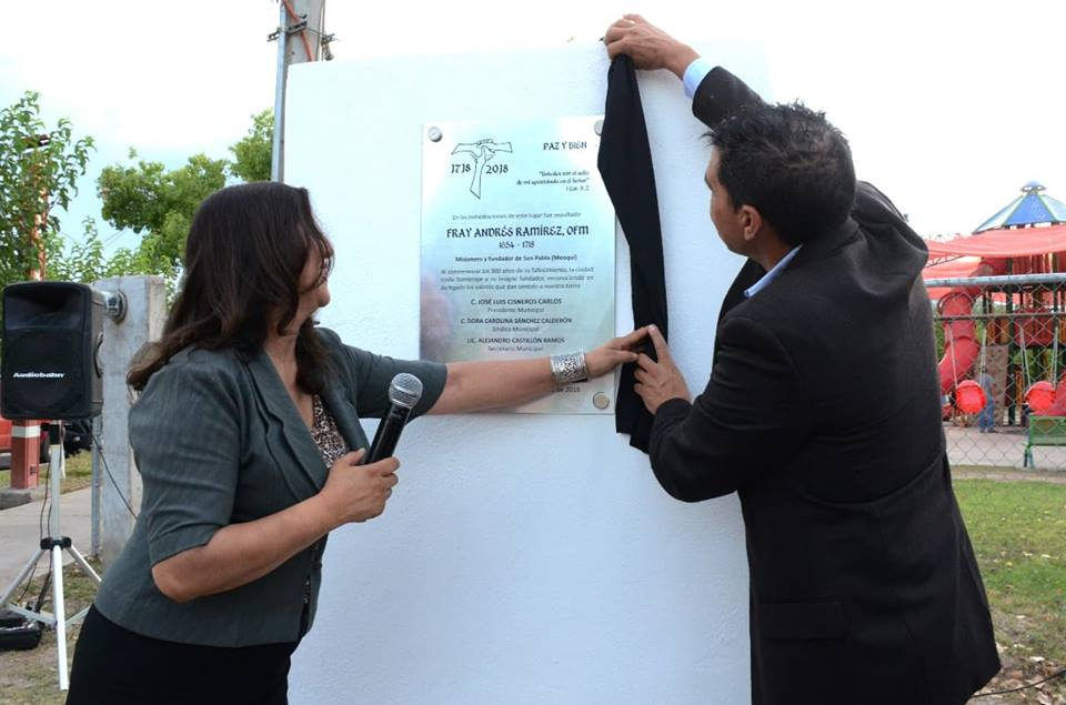 300 AÑOS DEL FUNDADOR